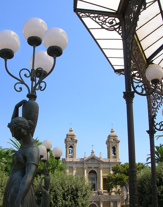 Taranto: Città Nuova